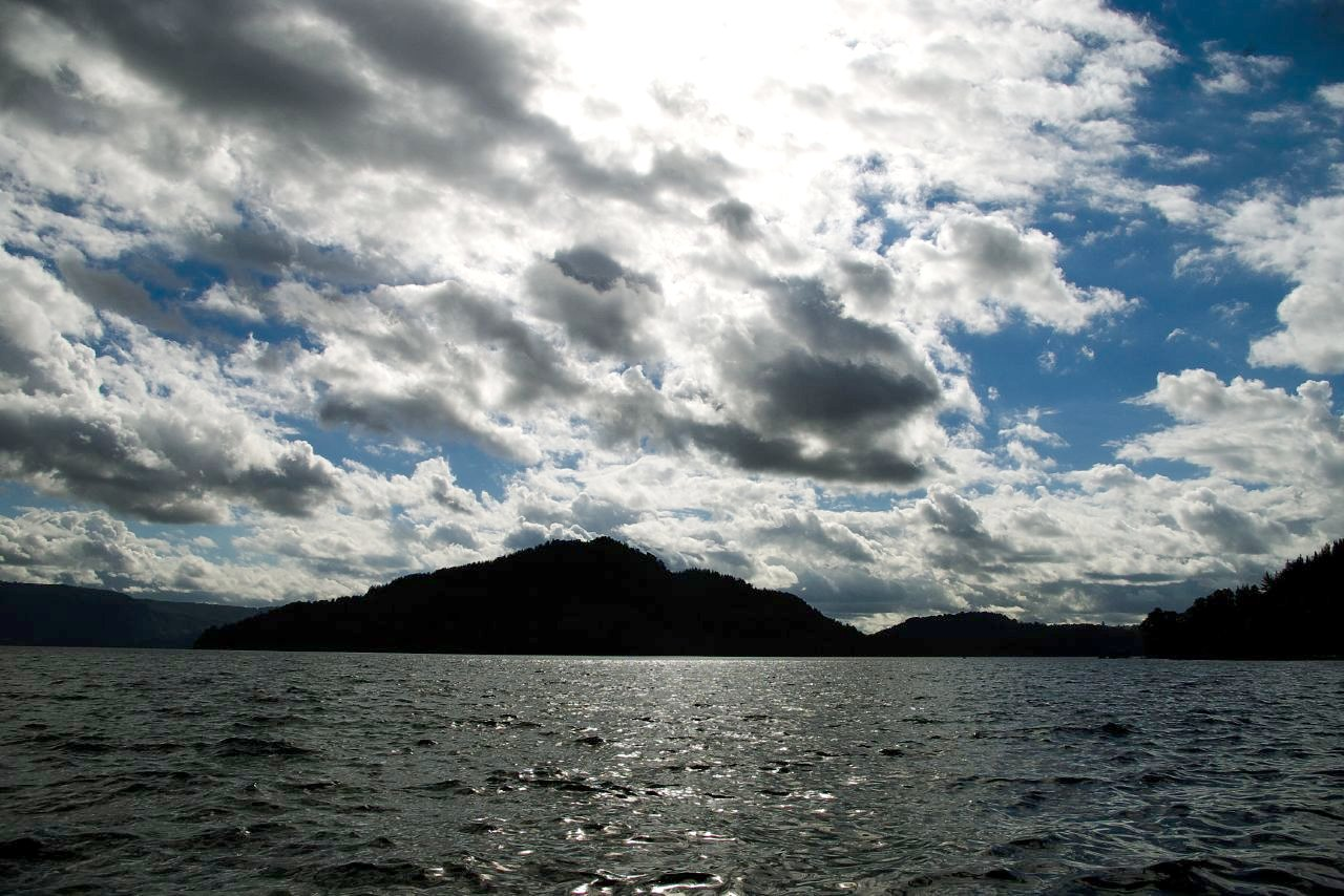 Lago Colico, Chile